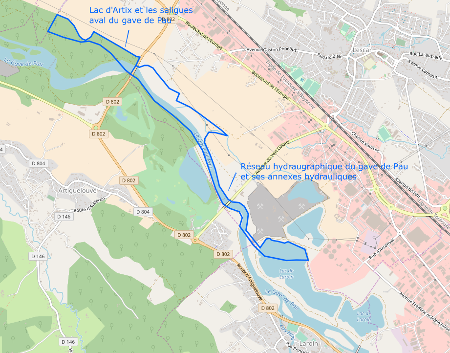 Carte délimitant les deux ZNIEFF sur les limites communales de Lescar.